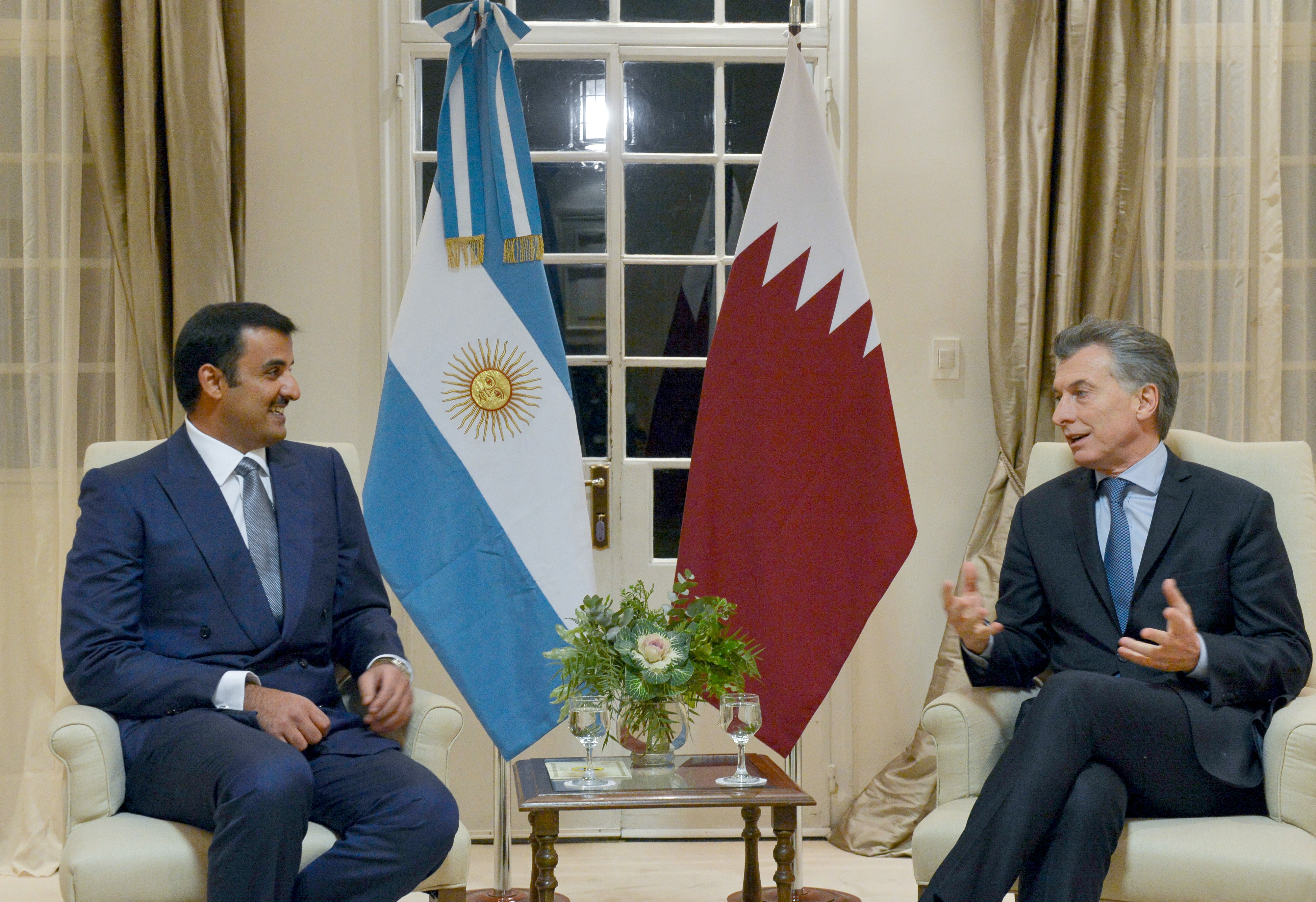 El presidente Mauricio Macri recibió al Emir de Qatar, Sheik Tamim bin Hamad Al Thani, con el objetivo de incrementar la cooperación y el comercio bilateral y fomentar la inversión para áreas clave del país como agroindustria, infraestructura y energía.